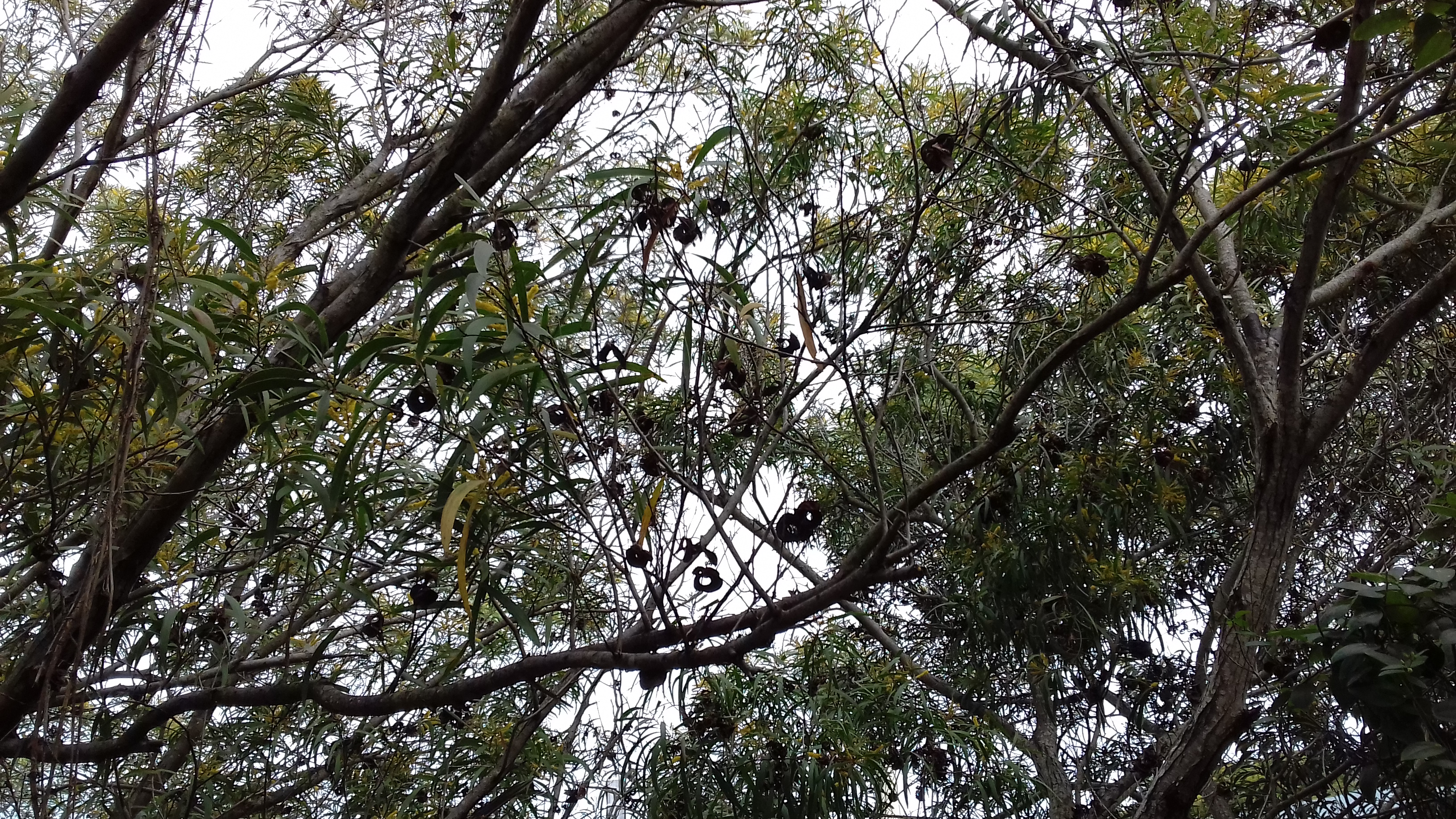 Acacia spirorbis (branches, feuillages, fleurs, fruits), Nouméa, Nouvelle-Calédonie